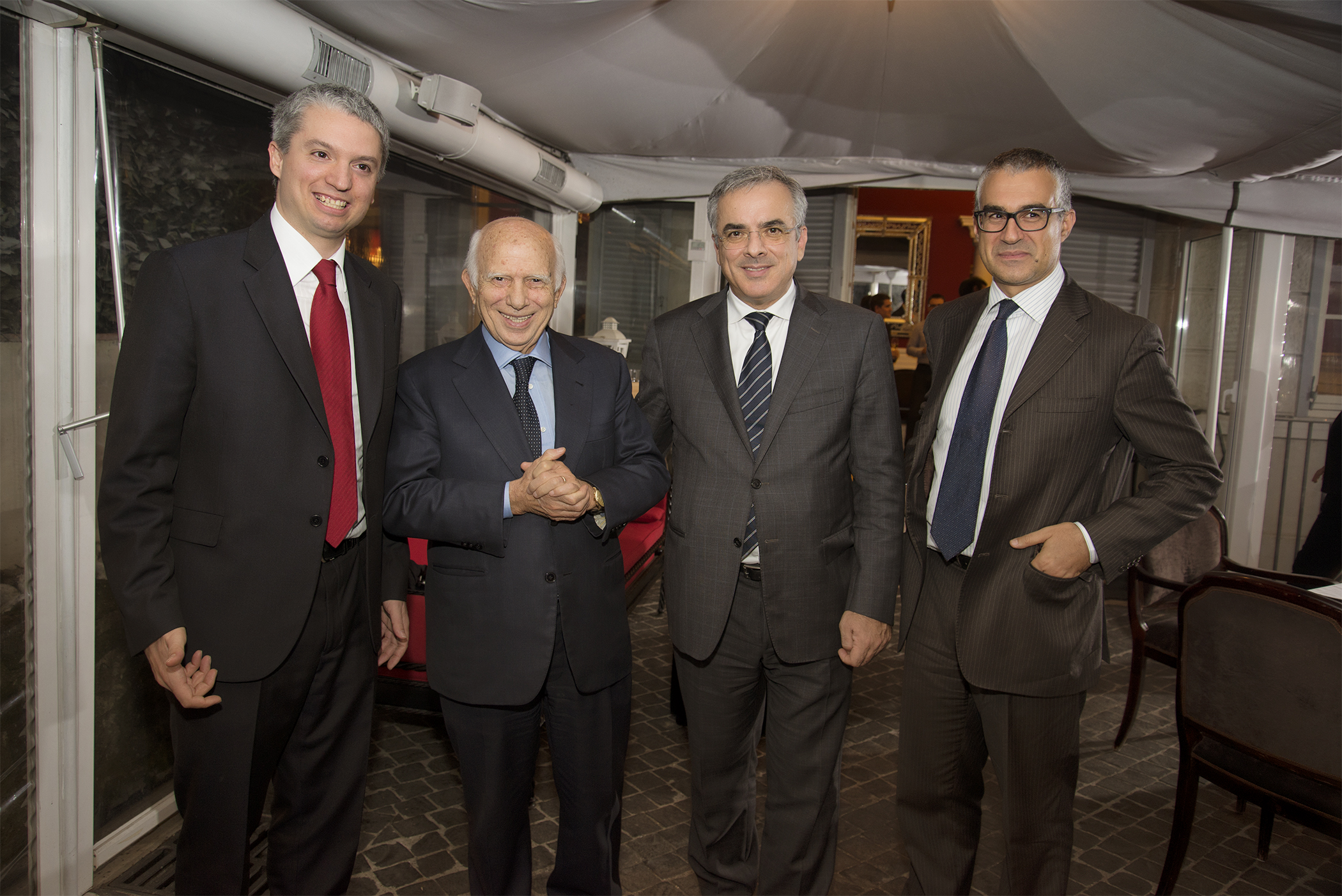 Think Tank Trinità dei Monti meeting 5 novembre 2015. Pierluigi Testa, Paolo Cirino Pomicino, Domenico Casalino